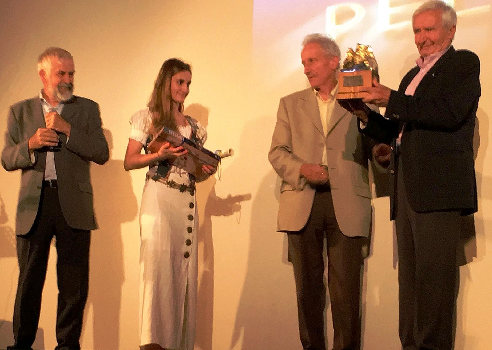 premiazione Pelmo d'Oro 2016